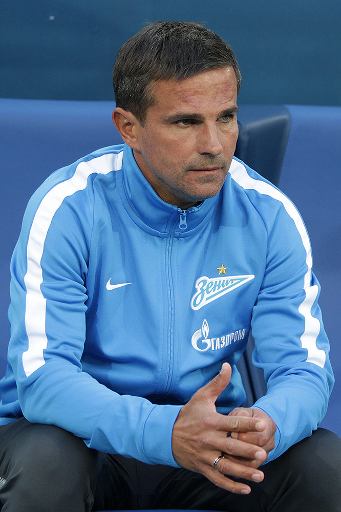 «Зенит» - «Бней-Иегуда»